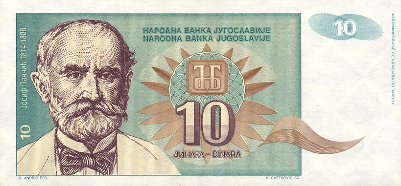 10 Yugoslav dinars note (1994 dinar)